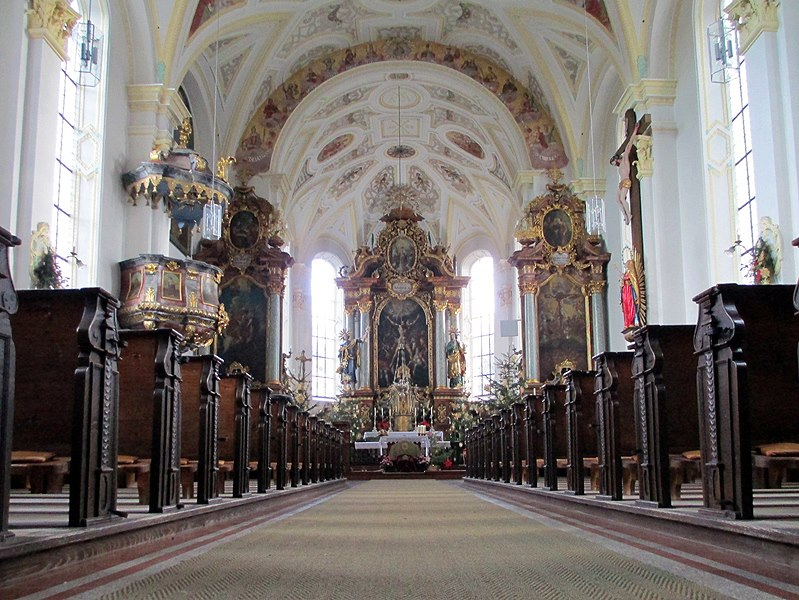 Innenansicht der Pfarrkirche St. Andrea (Elbach bei Fischbachau)